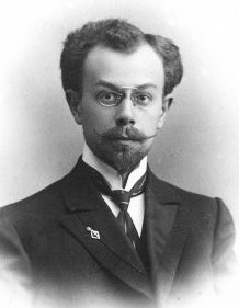 Vikentiy V. Pashukanis (1879-1920)